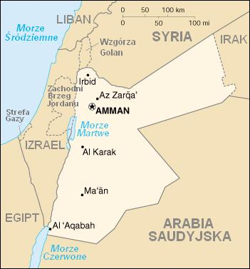 Mapa Jordanii, polska wersja mapy z CIA World Factbook